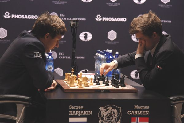 Карлсен - Карякин, тай-брейк